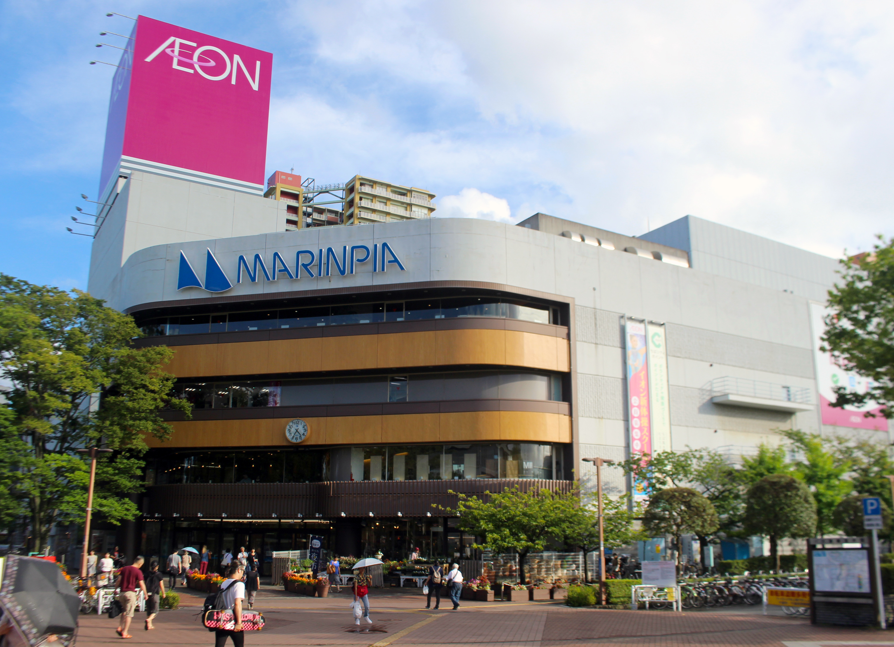 AEON Marinpia